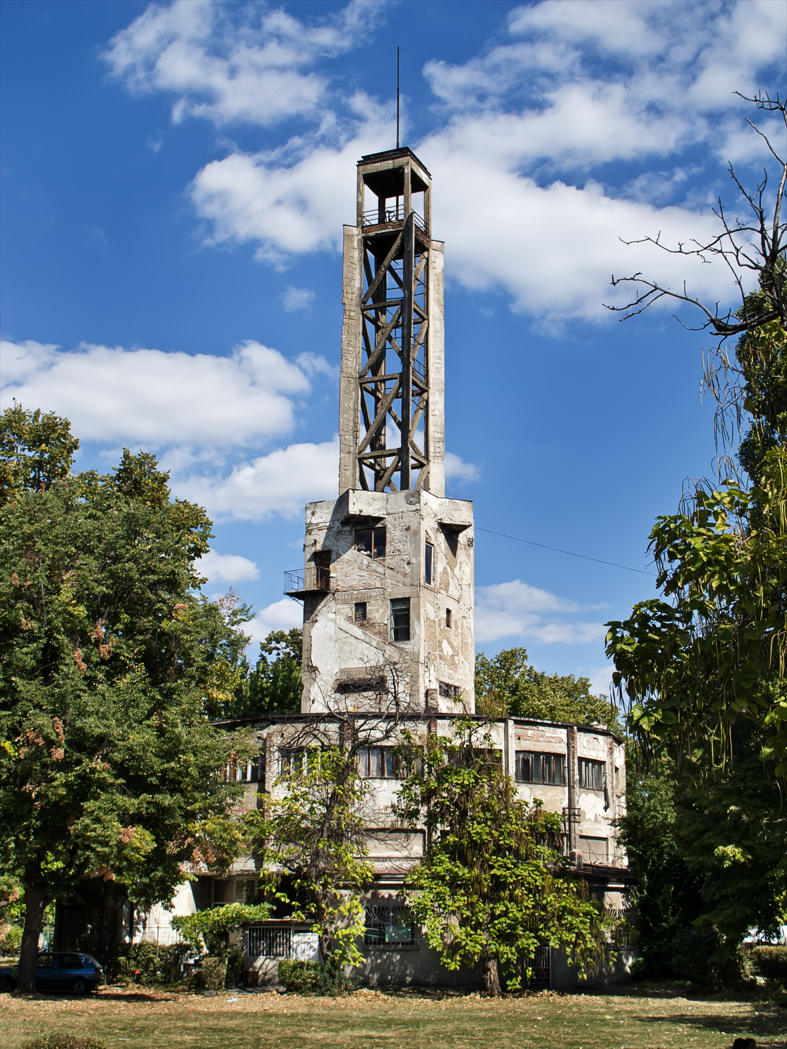 Старо сајмиште (централна зграда са кулом), Нови Београд, Београд, Србија